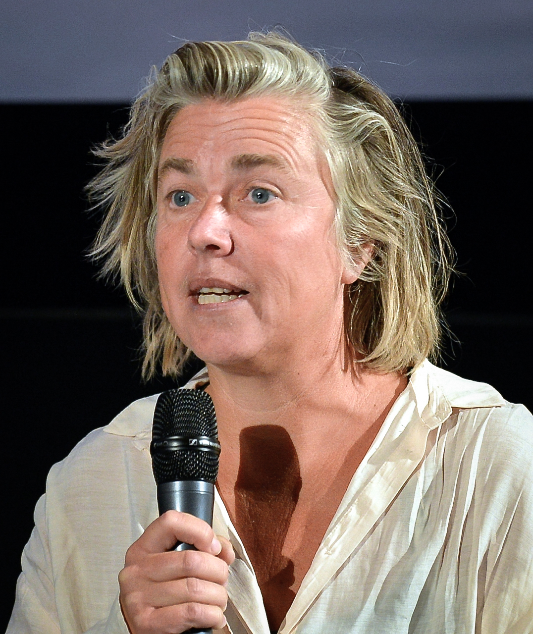 Stina Gardell under presentationen av den Svenska filmhösten 2014 i Filmhuset i Stockholm den 18 augusti 2014.